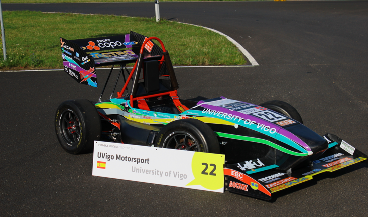 Monoplaza UM16